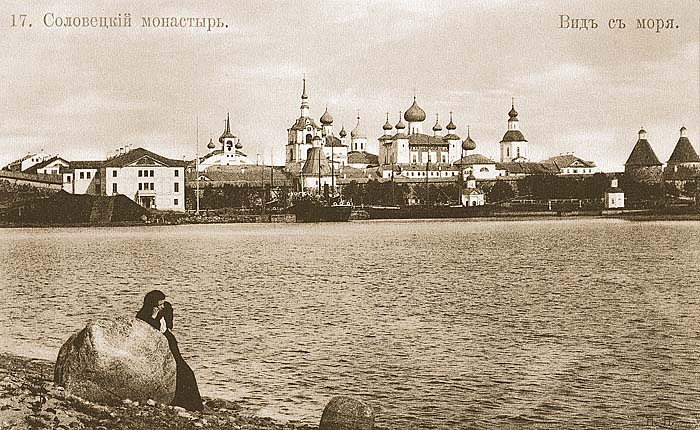 Открытка, изображающая вид на Соловецкий монастырь с Бухты Благополучия